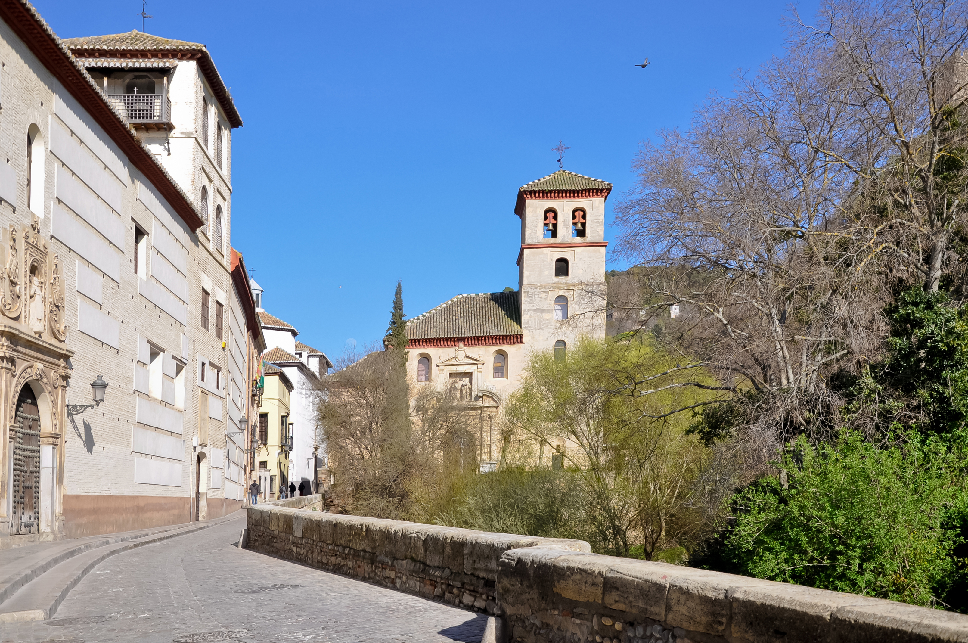 Iglesia de San Pedro y San Pablo in Granada, Spanje